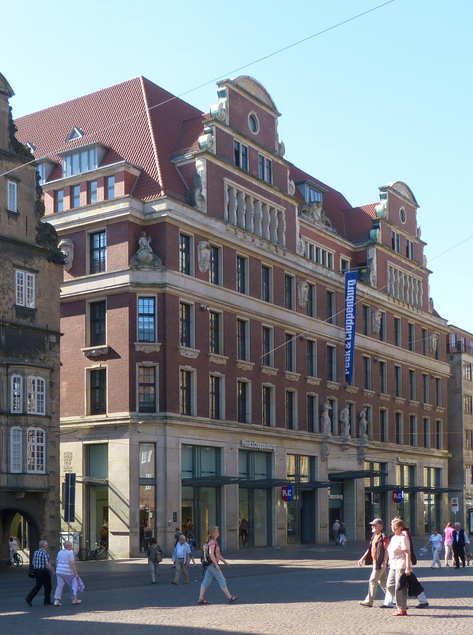 Schröder Bank, Wertpapierbörse, Peek und Cloppenburg in Bremen, Obernstraße 2Das abgebildete Objekt ist ein geschütztes Kulturdenkmal in der Freien Hansestadt Bremen, mit der Nr. 1282 beim Landesamt für Denkmalpflege registriert.